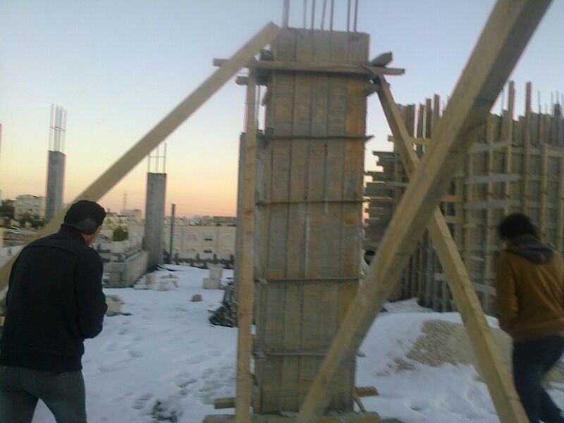 طوبار 7